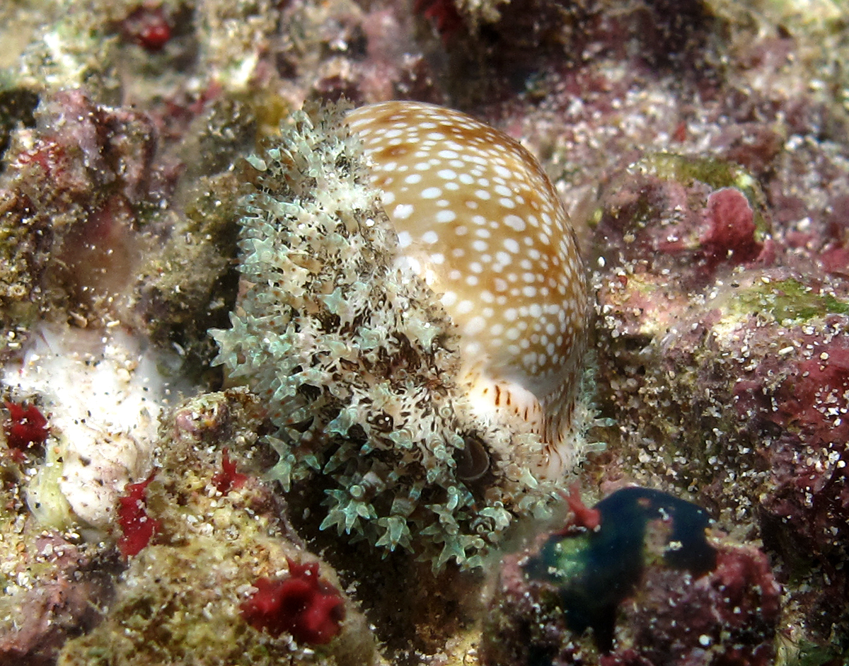 Le gastéropode Erosaria erosa à la Réunion.